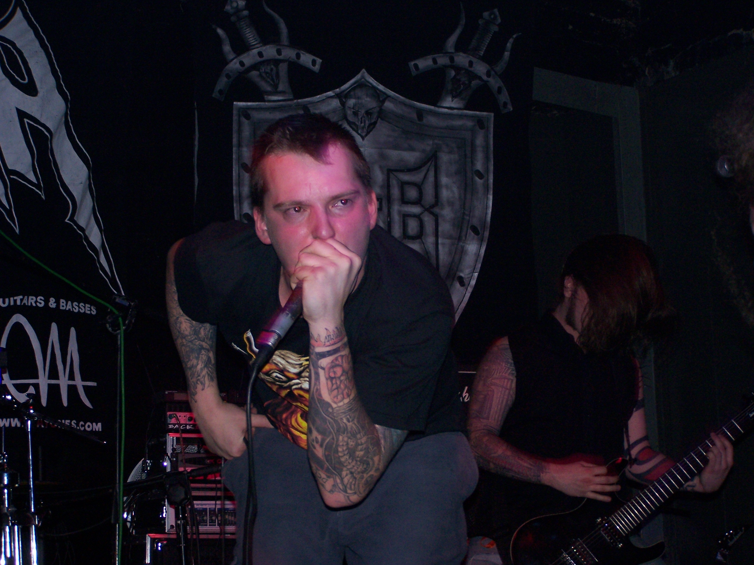 Patryk 'Nick' Zwolinski - wokalista zespołu Blindead podczas koncertu w katowickim Mega Clubie.